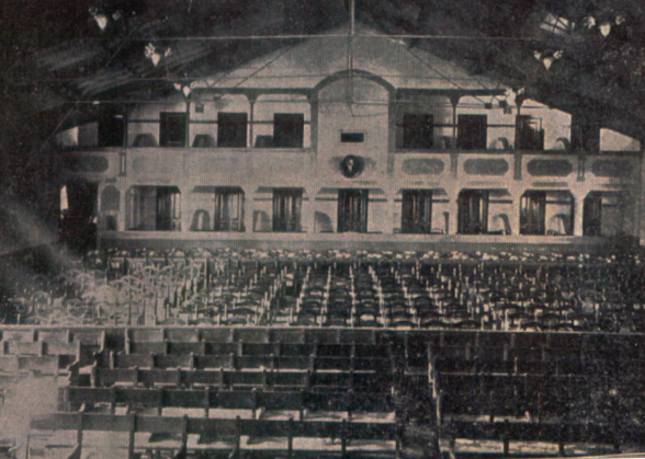 1910 yılında Boduroğlu Sineması olarak açılan sonraları ise kapanıp Zafer Sineması adıyla tekrar açılan salon.